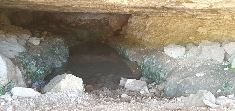 עין המסייעת 7020 - הנקבה